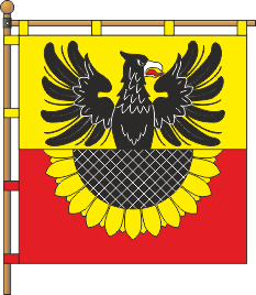 Прапор с. Сулимівка (Яготинський район)